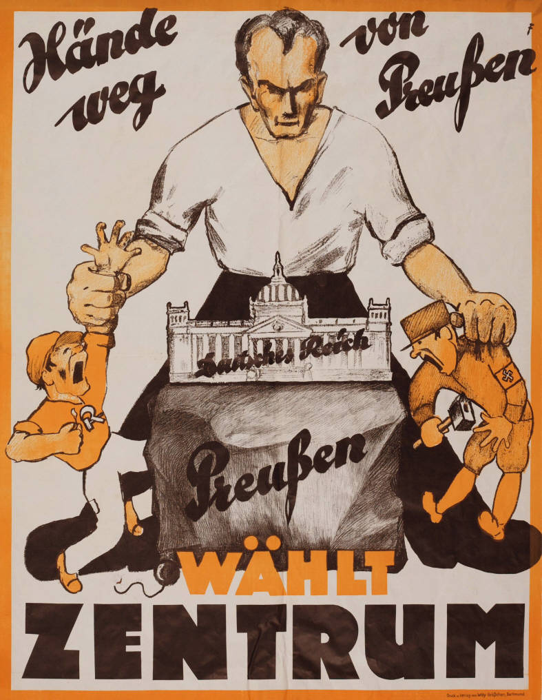 Hände weg von Preußen Deutsches Reich Preußen wählt Zentrum Abbildung: Überdimensionaler Preuße hält über den Deutschen Reichstag gebeugt einen schreienden Nazi und Kommunisten in seinen Händen Kommentar: Plakat auf dem Höhepunkt der Anti-Radikalen-Polemik der Parteien der Mitte im Kontext des Preußenschlags Plakatart: Motiv-/Textplakat Künstler_Grafiker: Signet "F" (unbekannt) Drucker_Druckart_Druckort: Druck und Verlag von Willy Größchen, Dortmund Objekt-Signatur: 10-043 : 18 Bestand: Plakatsammlung Weimarer Republik/NS-Zeit (10-043) GliederungBestand10-18: Zentrum Lizenz: KAS/ACDP 10-043 : 18 CC-BY-SA 3.0 DE